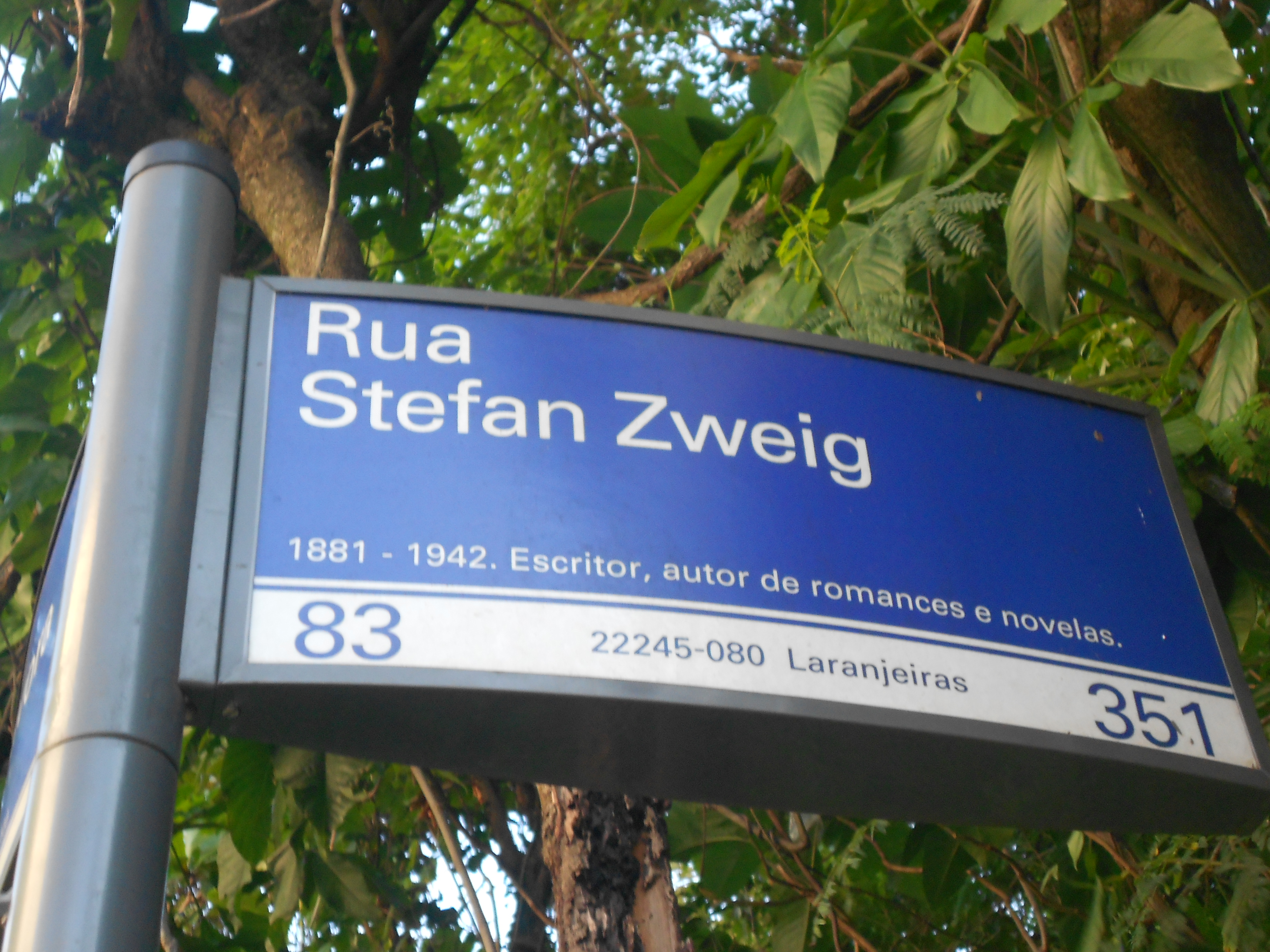 Placa da Rua Stefan Zweig, em Laranjeiras, Rio de Janeiro, Brasil.